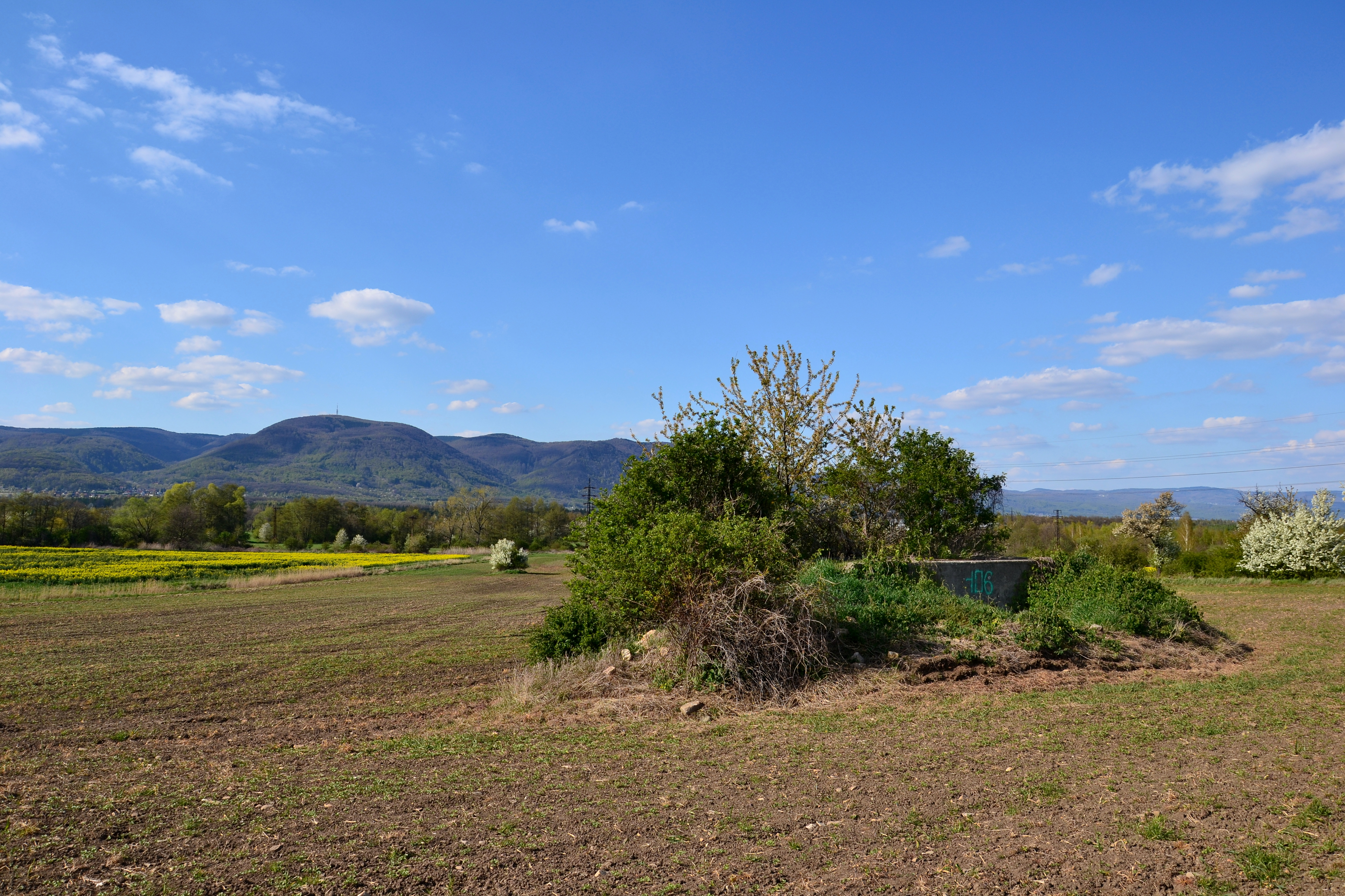 Objekt VI./109/C